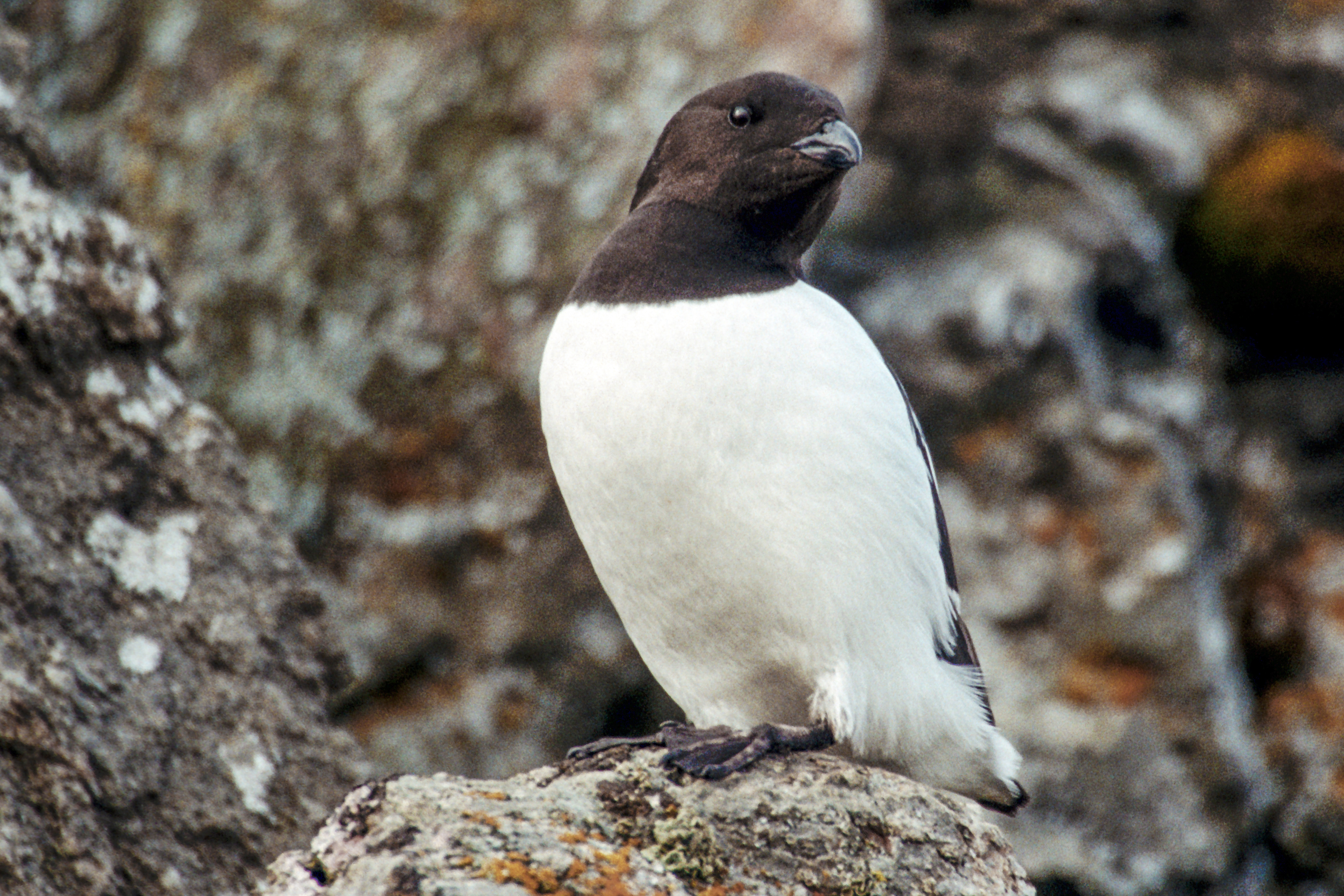 Little Auk Alle alle, Spitsbergen